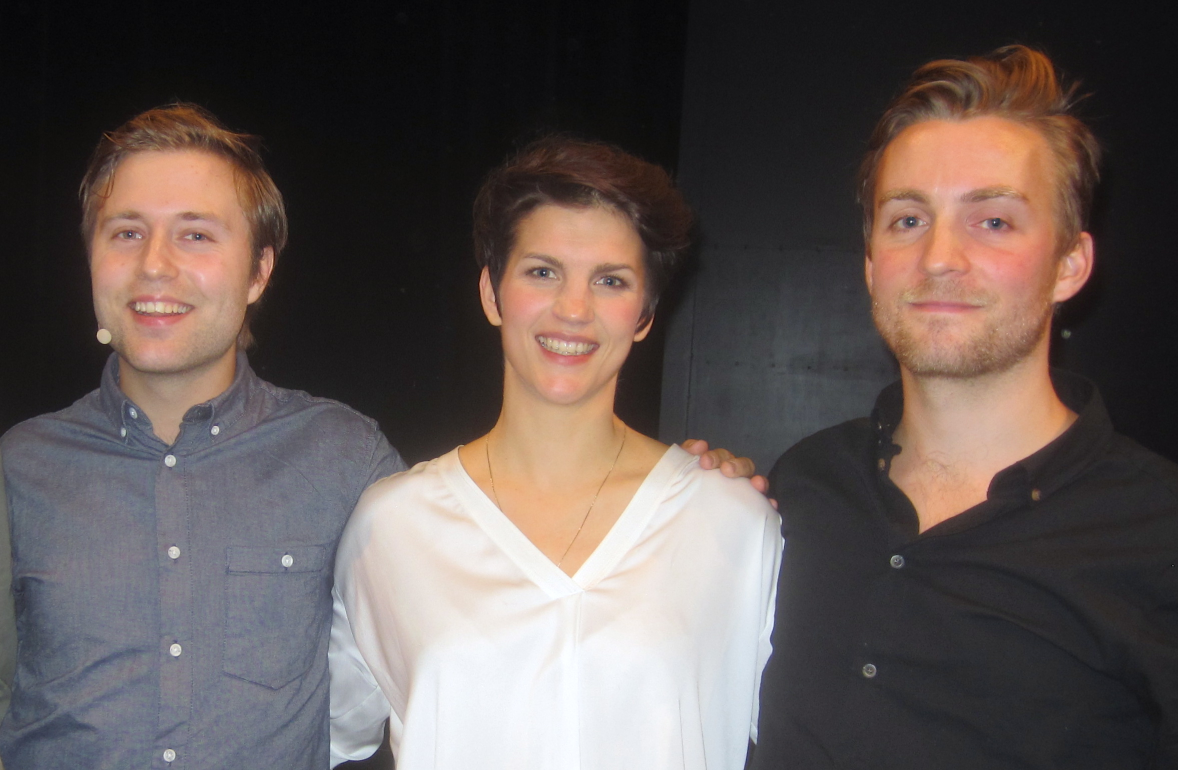 Oskar Nilsson, Maria Ylipää och Robert Noack gör tre av huvudrollerna i "Kristina från Duvemåla"